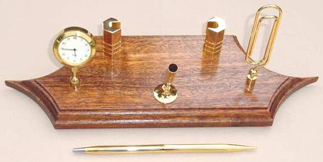 peça em andiroba